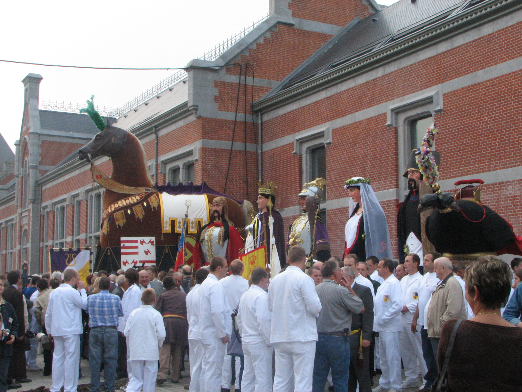 Rassemblement des géants le dimanche de la ducasse d'Ath 2006